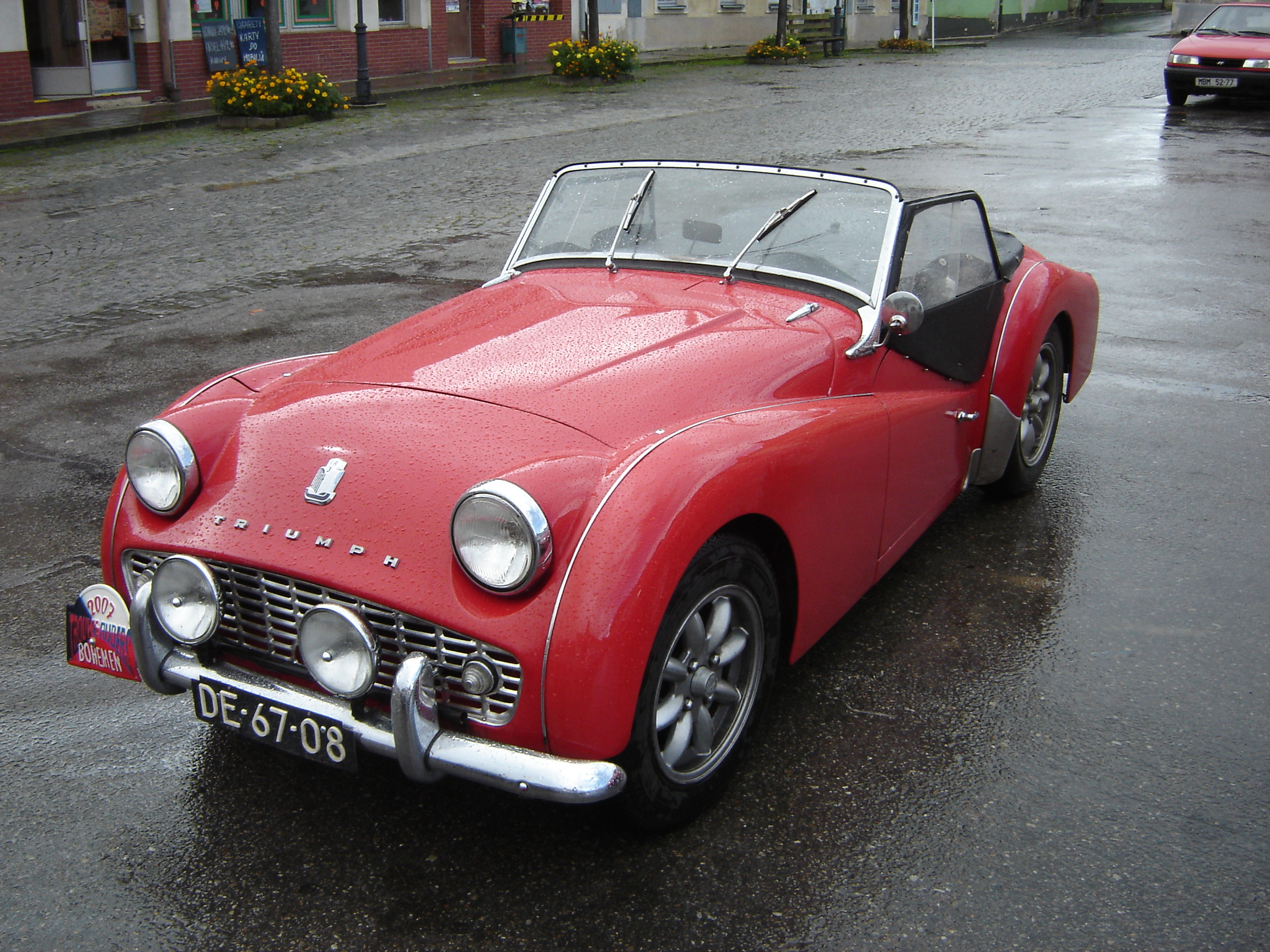 Triumph TR3